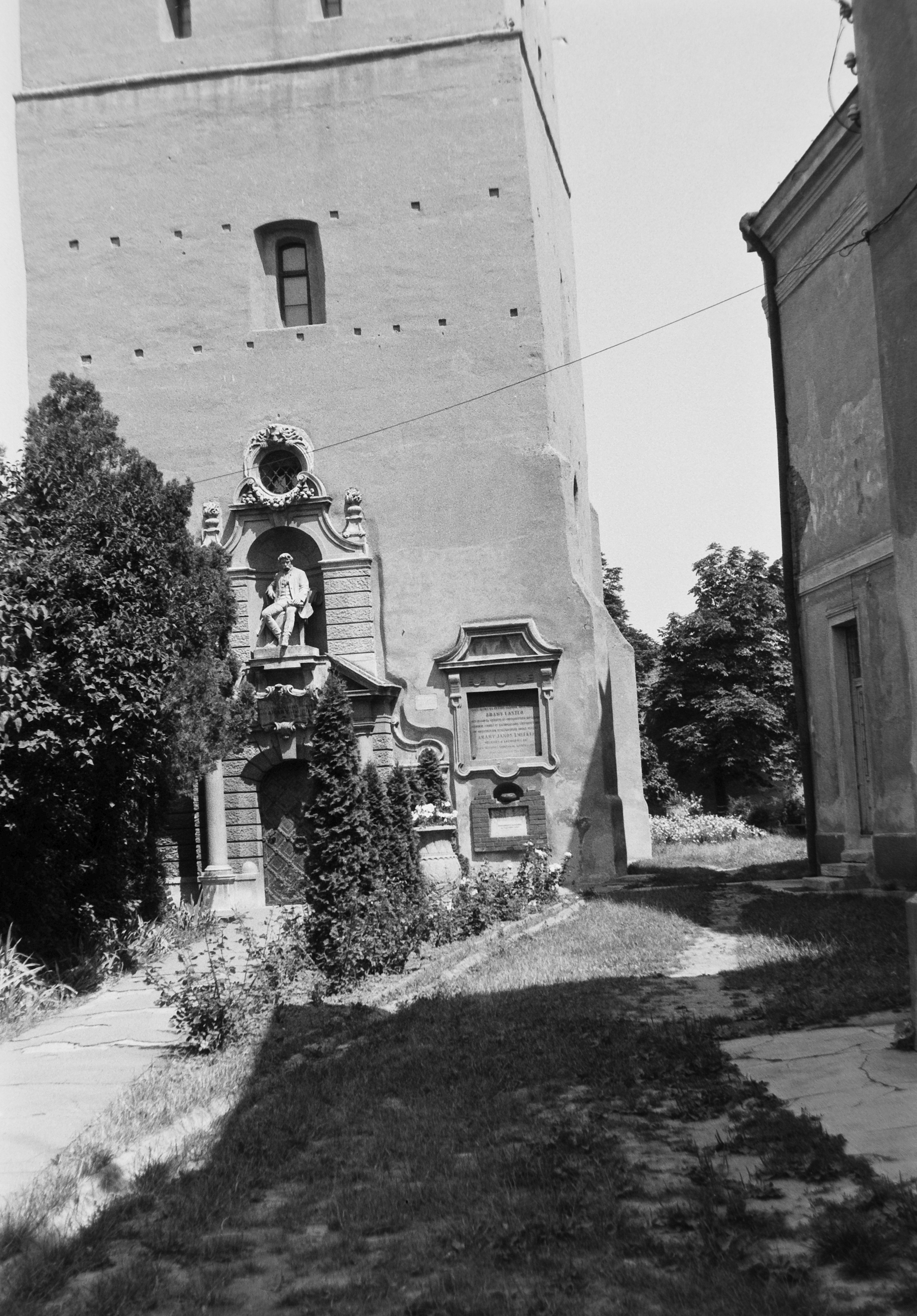 Csonkatorony, Arany János-emlékmű (Stróbl Alajos és Kolozsvári Szeszák Ferenc). Location: Romania, Transylvania, Salonta Title: Csonkatorony, Arany János-emlékmű (Stróbl Alajos és Kolozsvári Szeszák Ferenc).